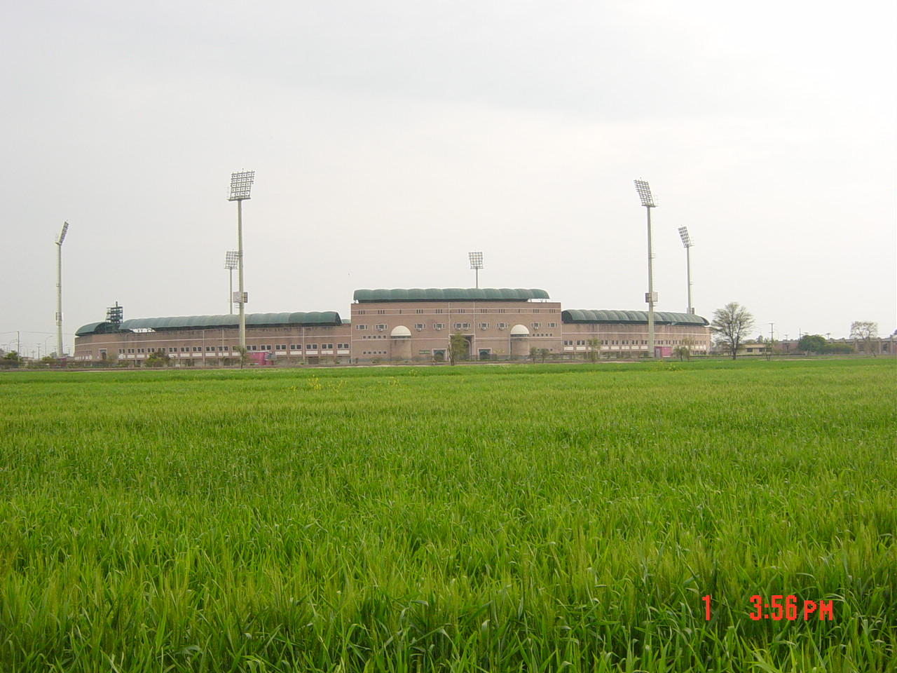 Nayab City Extension, Multan, Pakistan